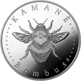 50 litas coin